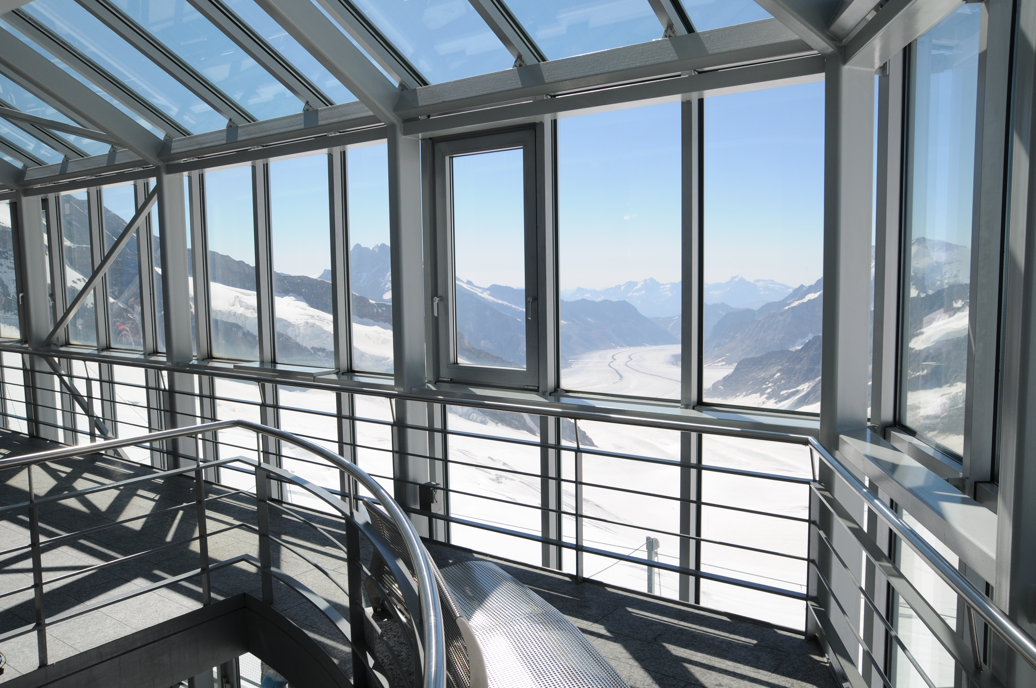 Berner Oberland.